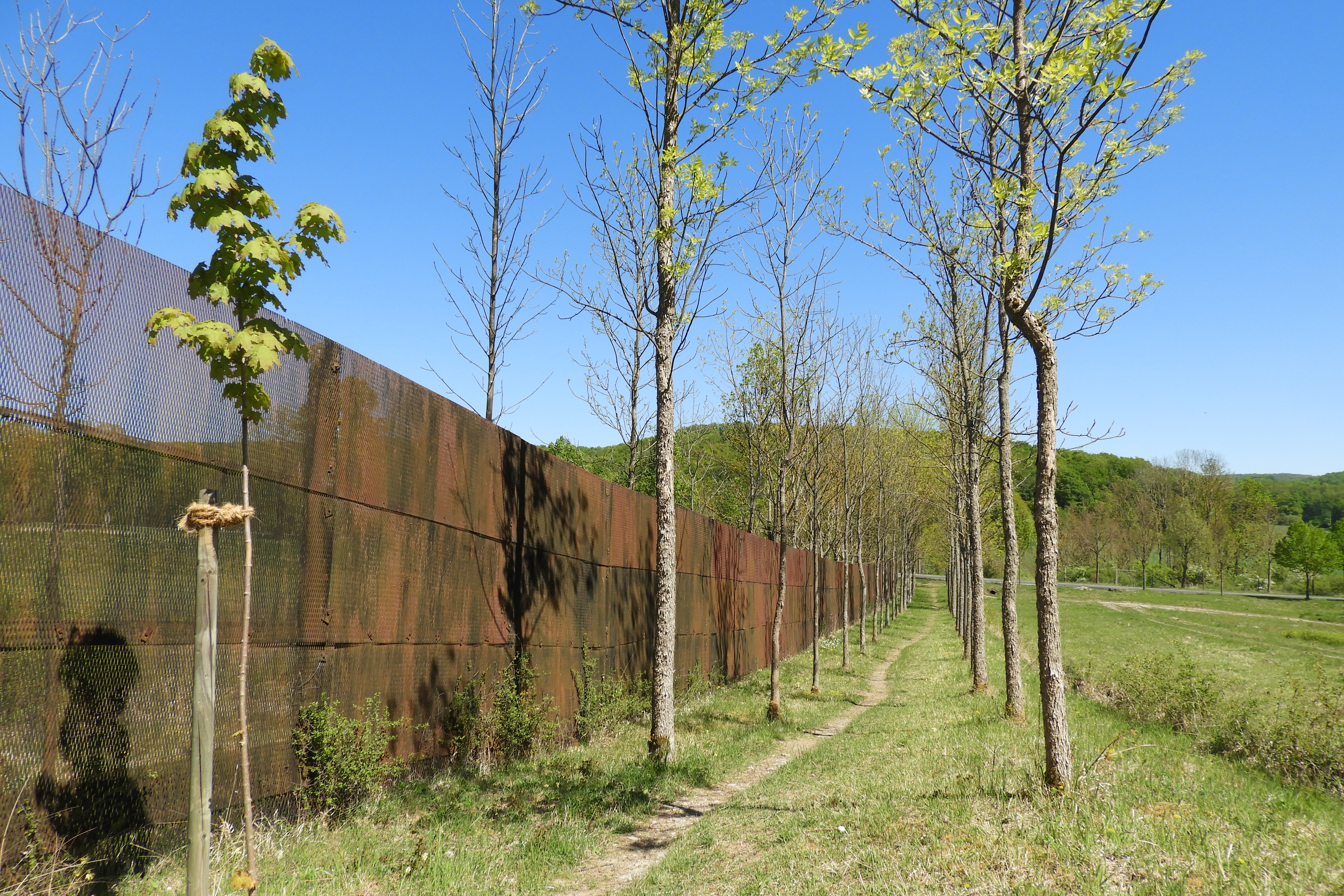 Das „Baumkreuz bei Ifta“ wurde am 16. und 17. November 1990 mit 140 Bäumen auf der ehemaligen deutsch-deutschen Grenze, als „Start-Skulptur“, für eine West und Ost verbindende Allee zwischen Kassel und Eisenach gepflanzt. Das Baumkreuz besteht aus einer Eschenallee auf dem früheren Grenzstreifen, die eine Lindenallee entlang der Bundesstraße, die Thüringen mit Hessen verbindet, kreuzt. Zwischen den drei Eschenreihen steht der Grenzzaun, einer der längsten noch original erhaltenen Teile in Deutschland. Die „Aktion Baumkreuz“ knüpfte an den „Erweiterten Kunstbegriff“ von Joseph Beuys an, den dieser mit dem Projekt „7000 Eichen“ in Kassel verbunden hatte. Seit 1990 kommen jedes Jahr im November Menschen aus ganz Deutschland und helfen mit, das Projekt fortzupflanzen. Es ist mittlerweile auf mehr als eintausend Bäume angewachsen. Getragen wurde die Aktion bis 2014 von dem inzwischen gelöschten „Unternehmen Wirtschaft und Kunst – erweitert“, danach vom BUND Thüringen. Angelegt wurde das Baumkreuz dort, wo die Bundesstraße 7 die thüringisch-hessische Landesgrenze durchquert. Der Bereich gehört zu der Gemarkung von Ifta, einem Stadtteil von Treffurt im westthüringischen Wartburgkreis und grenzt an die Gemarkung von Lüderbach, einem Ortsteil der Gemeinde Ringgau im nordhessischen Werra-Meißner-Kreis.